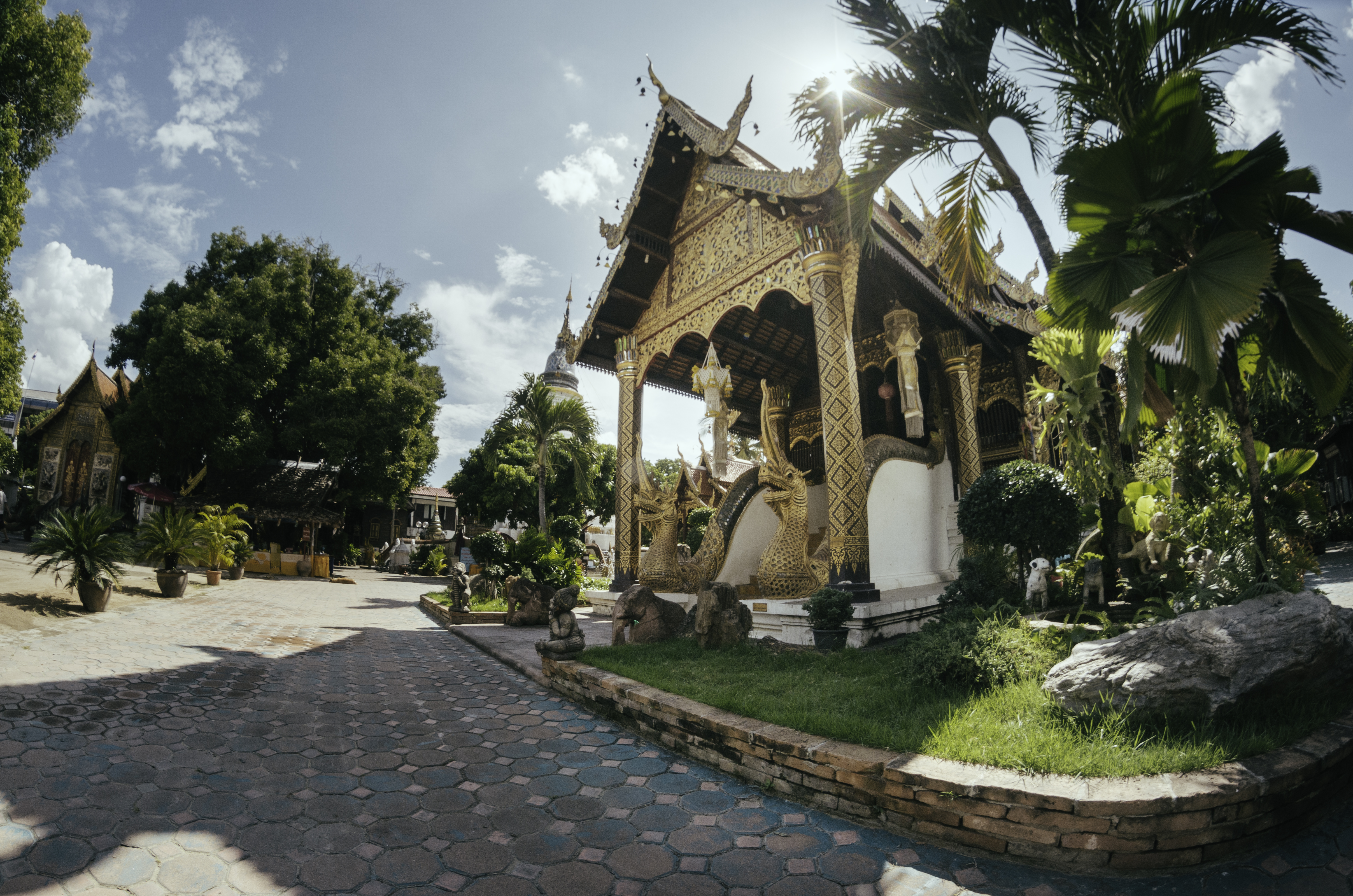 วัดเกตการาม